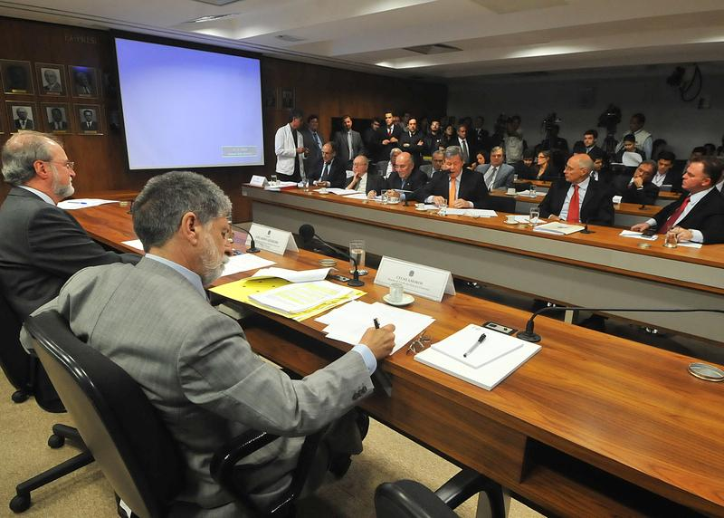 Brasília - O ministro das Relações Exteriores, Celso Amorim participa de audiência pública na Comissão de Relações Exteriores do Senado sobre o posicionamento do Brasil em relação ao programa nuclear do Irã (José Cruz/ABr)